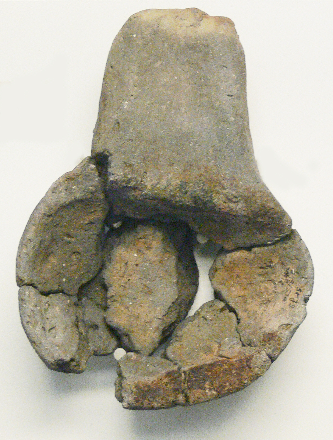 Gusstiegel, 4. Jh. v. Chr., gefunden am Schreckensee, Gemeinde Wolpertswende Württembergisches Landesmuseum Stuttgart